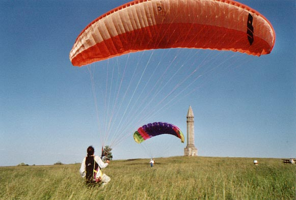 monument Barrès sur la colline de Sion (Saxon-Sion). Catégorie:Image de commune de Meurthe-et-Moselle